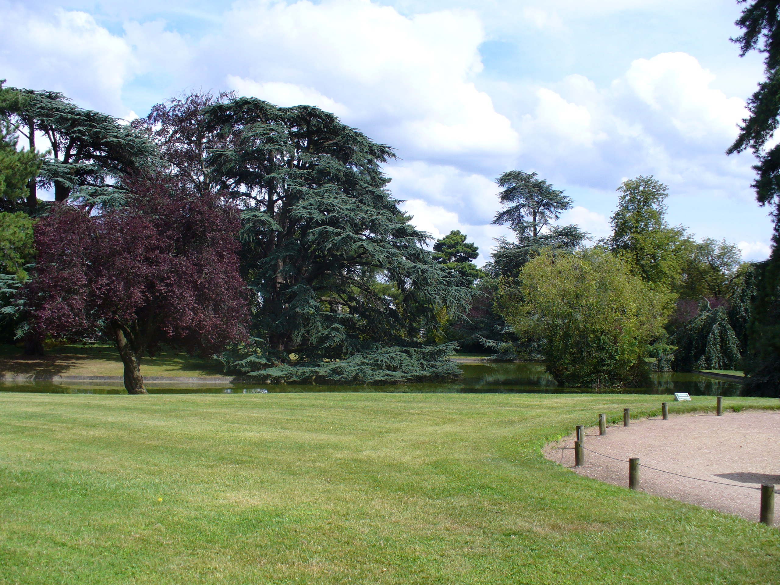 Jardin du Trocadéro situé dans le parc de Saint-Cloud (Hauts-de-Seine)